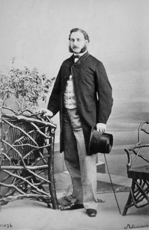 Photographie - L. L. Beaubien, Montréal, QC, 1864 - Sels d'argent sur papier monté sur papier - Papier albuminé. Louis Beaubien (27 juillet 1837-19 juillet 1915) fut un homme d'affaires et homme politique fédéral et provincial du Québec.